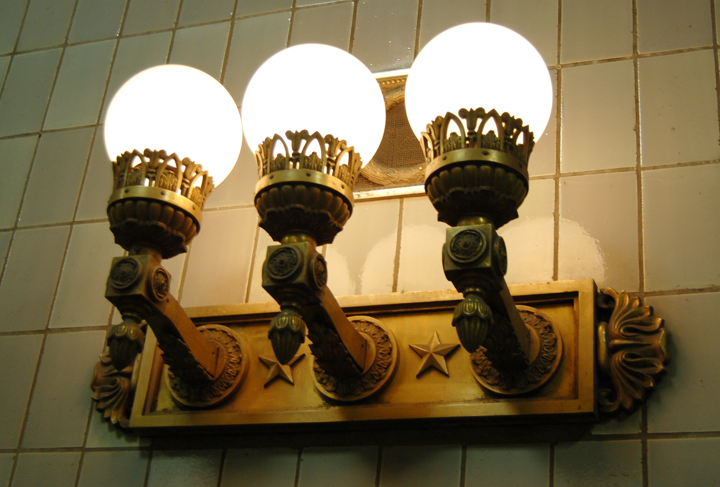 Станция метро «Вокзальная», светильники в кассовом зале